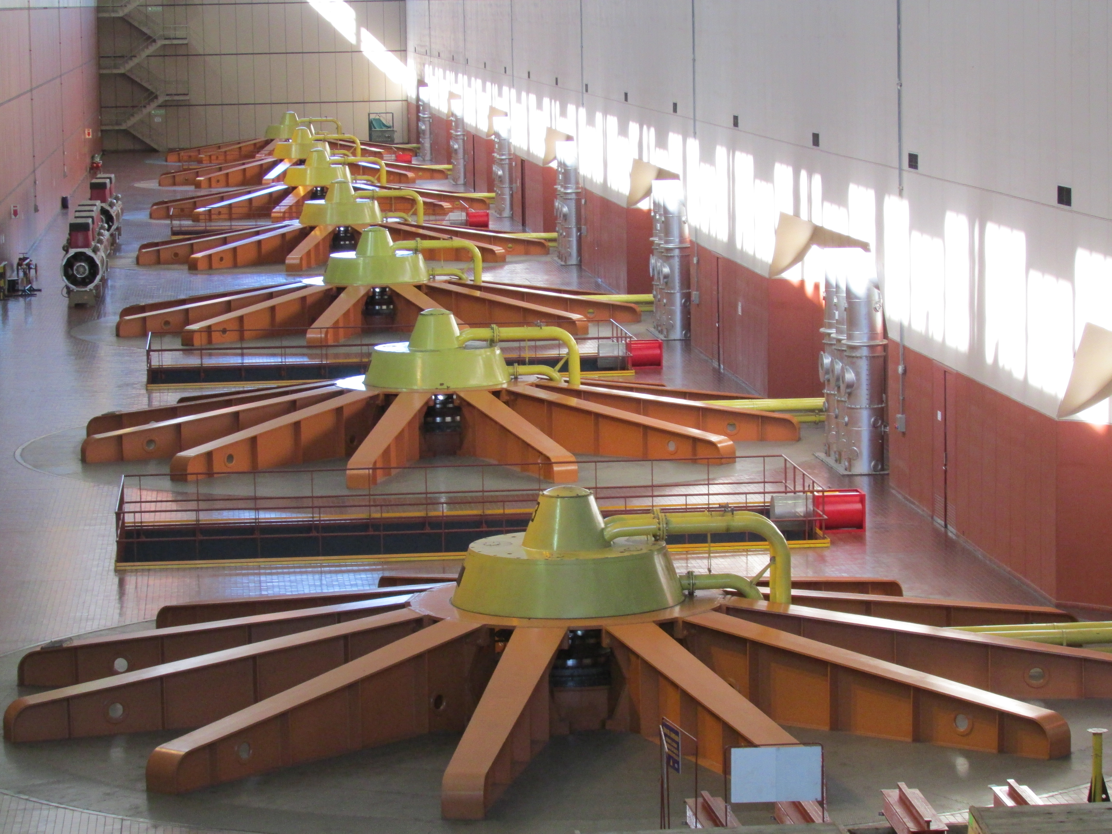 Turbinas de la sección argentina de la represa de Salto Grande en el departamento Concordia, provincia de Entre Ríos, Argentina.